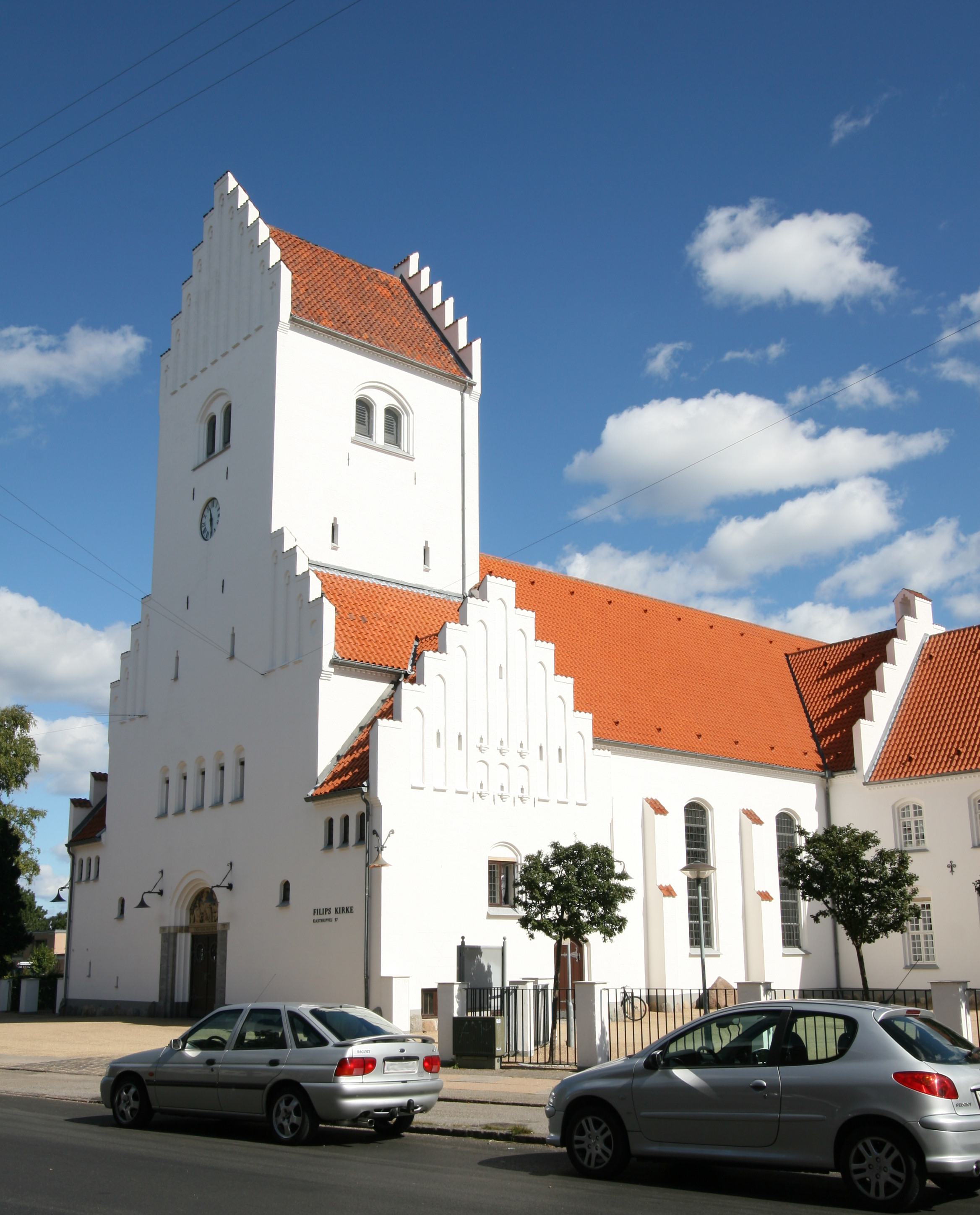 Filips Kirke, Amager, Copenhagen, Denmark. Filips Church